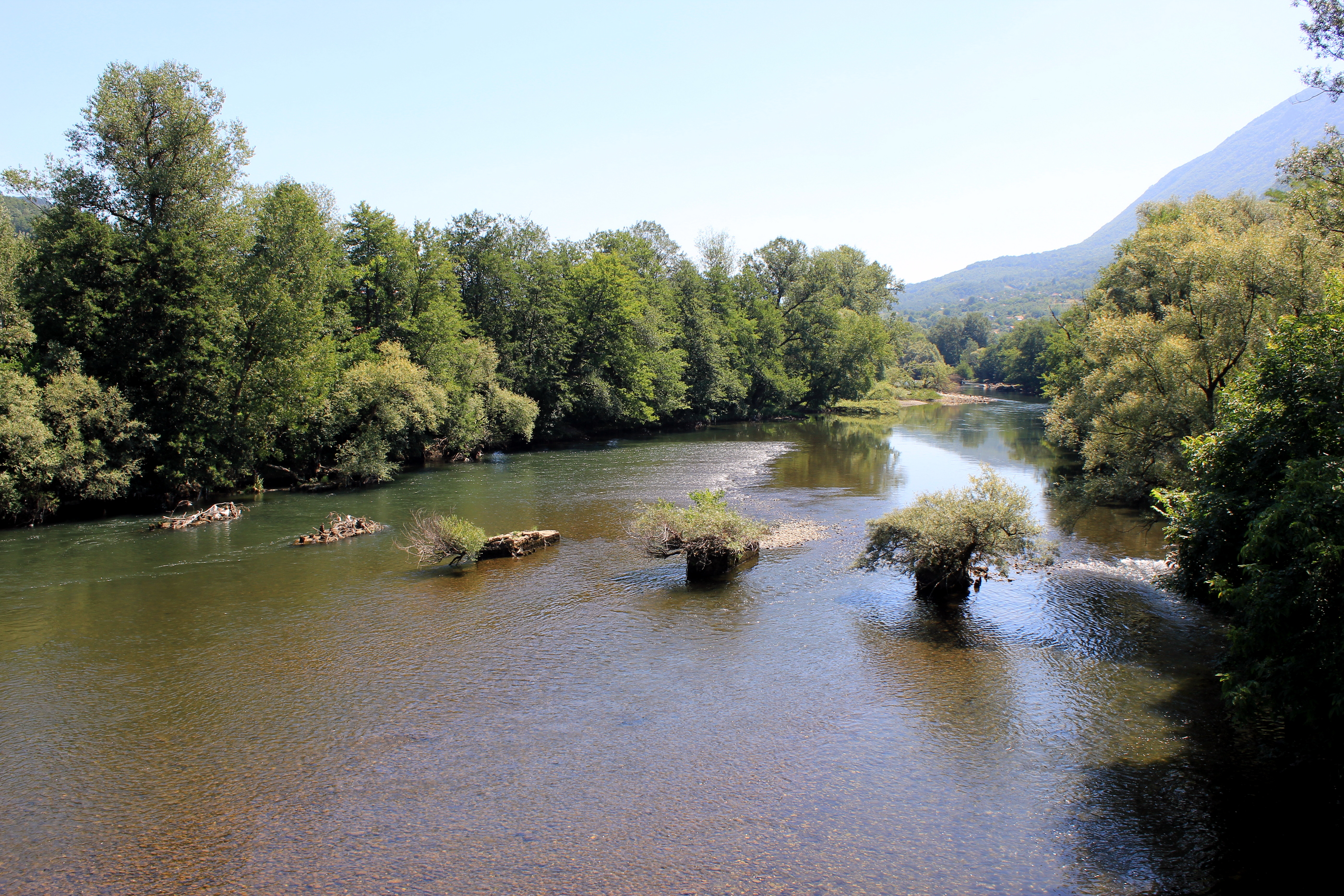 Ehemalige Brücke über den Lim bei Mioče, Gemeinde Rudo, Bosnien und Herzegowina.